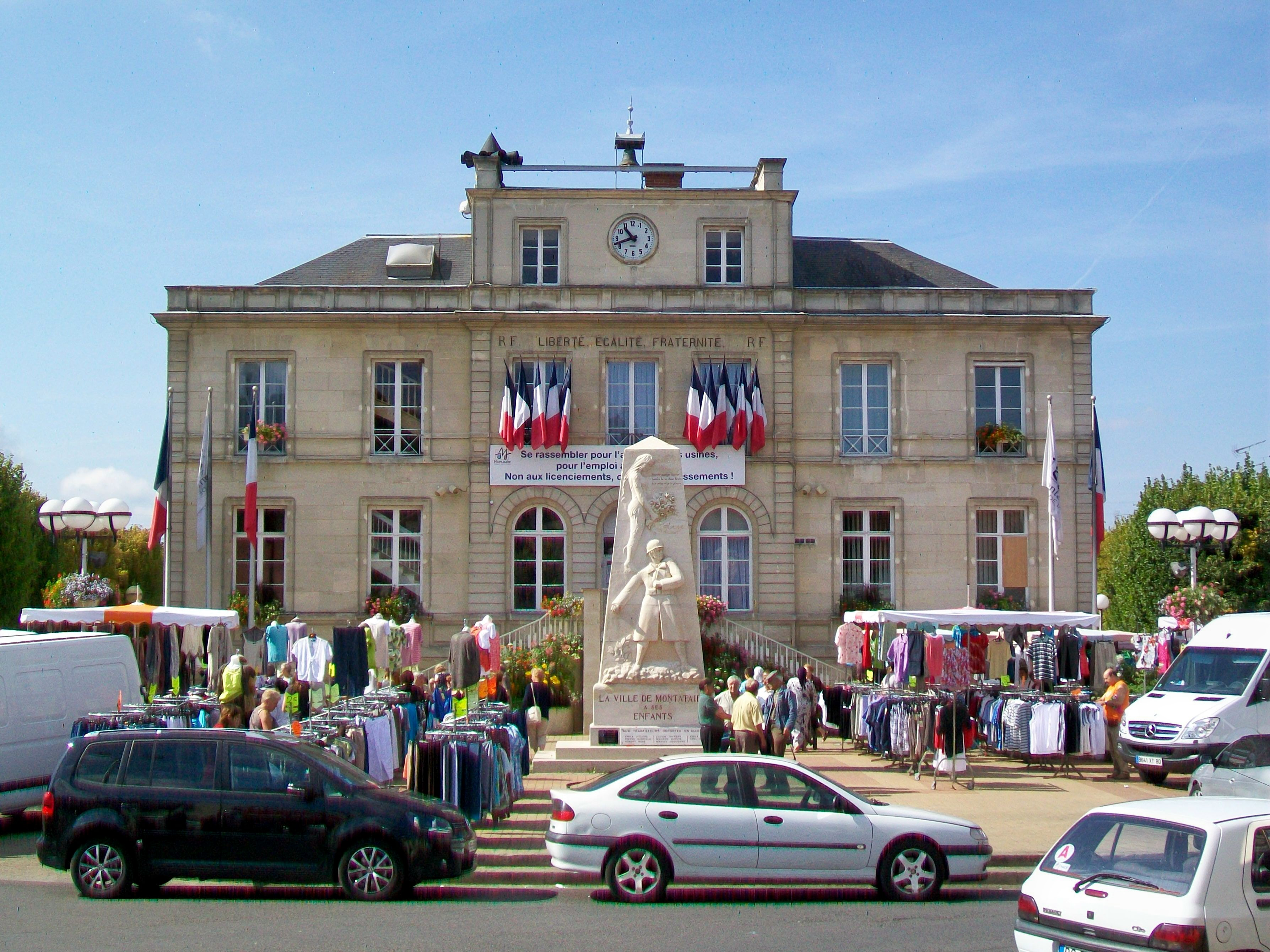 L'Hôtel de ville, façade principale nord, et le monument aux morts.